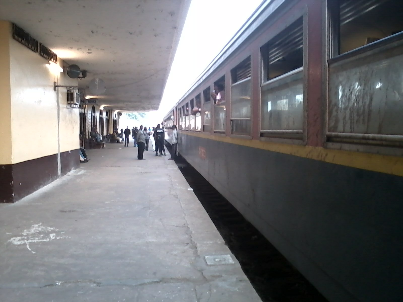 rame d un train voyageur stationne en pleine gare de pointe noire au congo This is an image with the theme "Africa on the Move or Transport" from: Congo